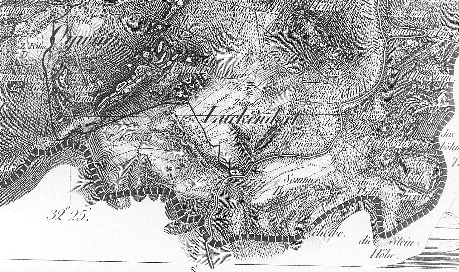 Original image description from the Deutsche FotothekOybin-Lückendorf. Oberreit, Sect. Zittau, 1844/46